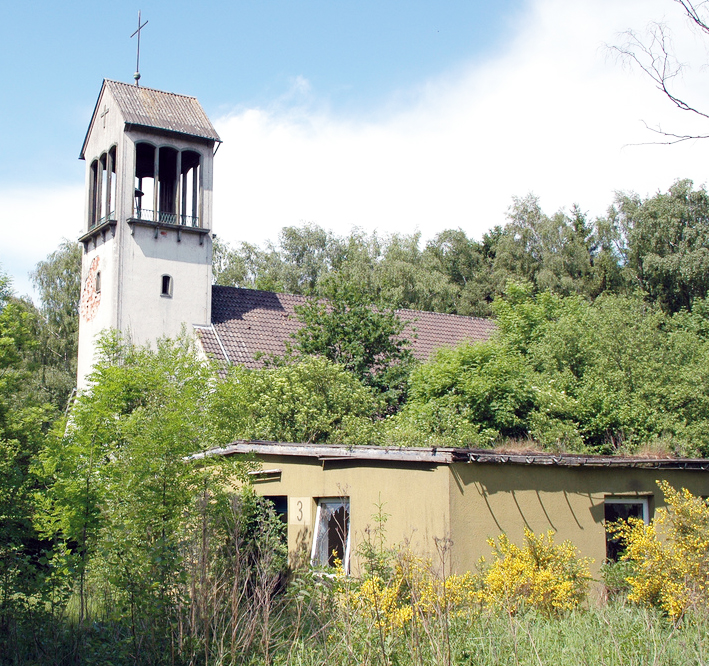 Albuhera Barracks, heutiger Zustand.